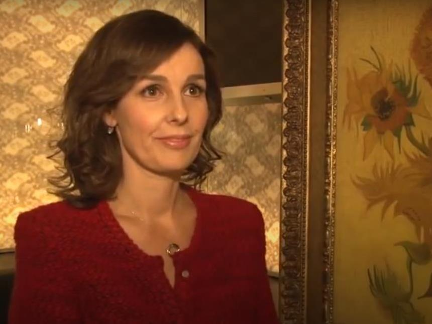 Prinses Anita van Oranje onthulde op 12 december 2013 een nieuwe generatie Van Gogh reproducties in het VIP Centre van Schiphol.